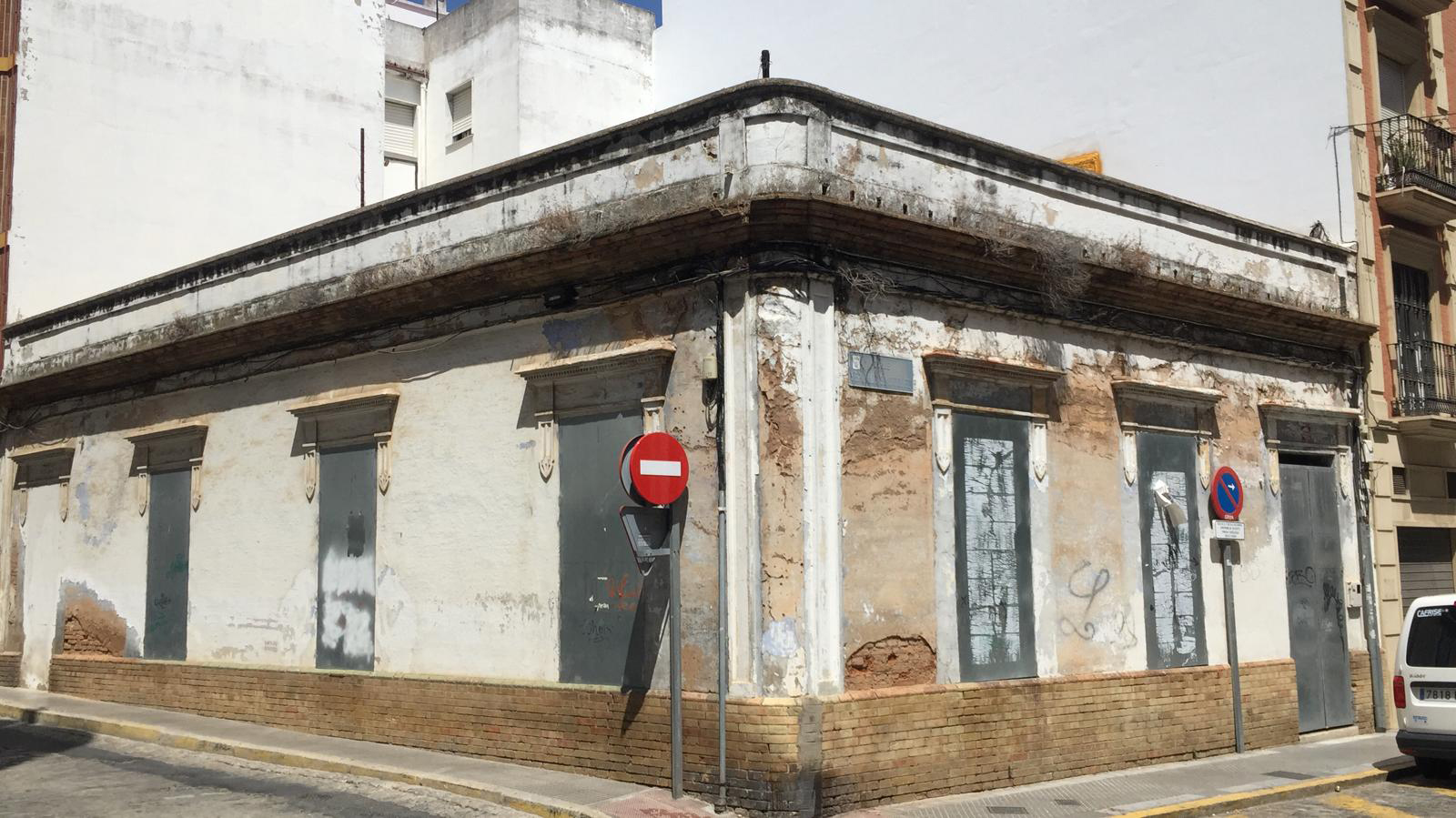 Casa natal Diego Díaz Hierro en Huelva